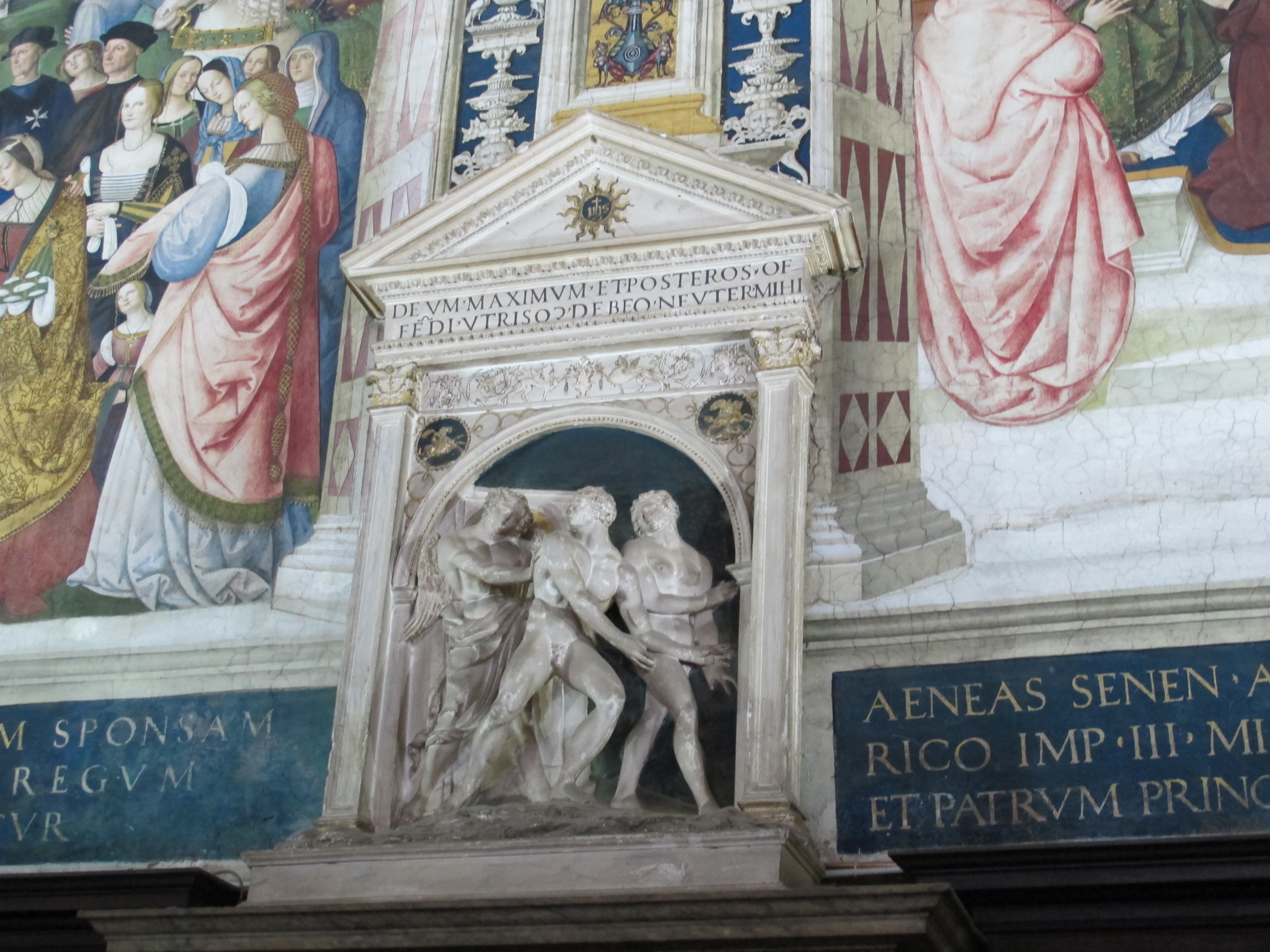 Libreria piccolomini, marrina (attr.) cacciata dal paradiso terrestre